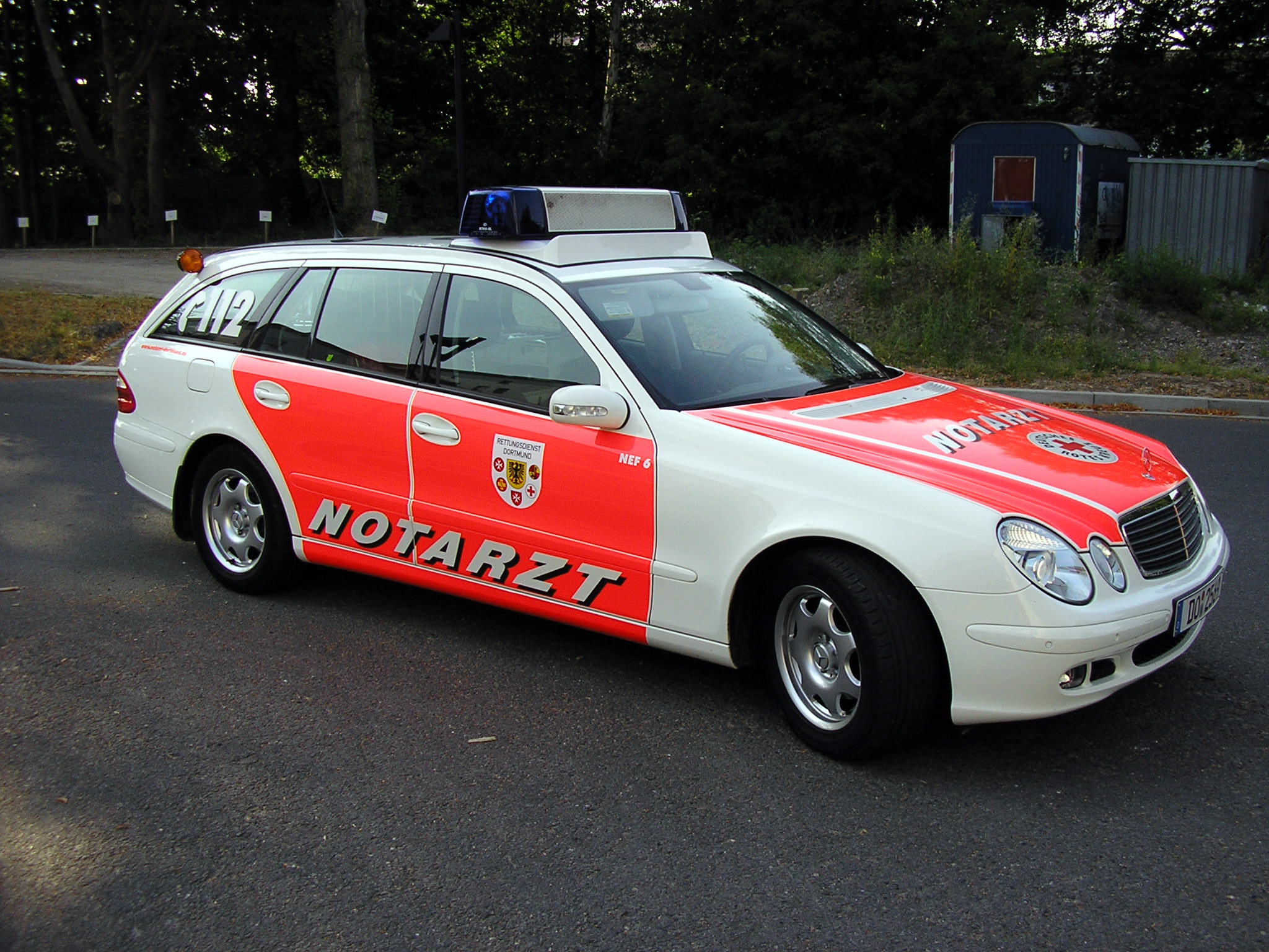 Notarzteinsatzfahrzeug der aktuellen Generation im Dortmunder Rettungsdienst